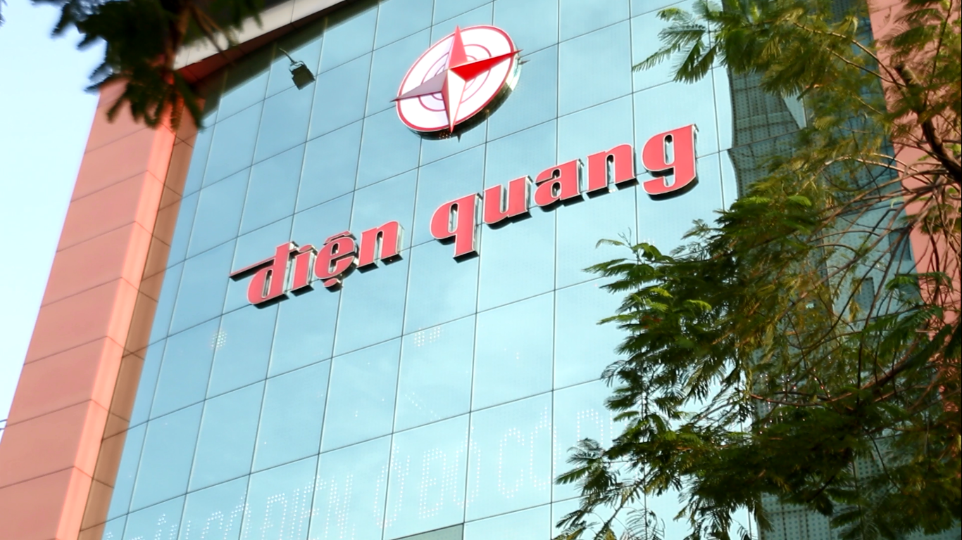 hinh anh cong ty